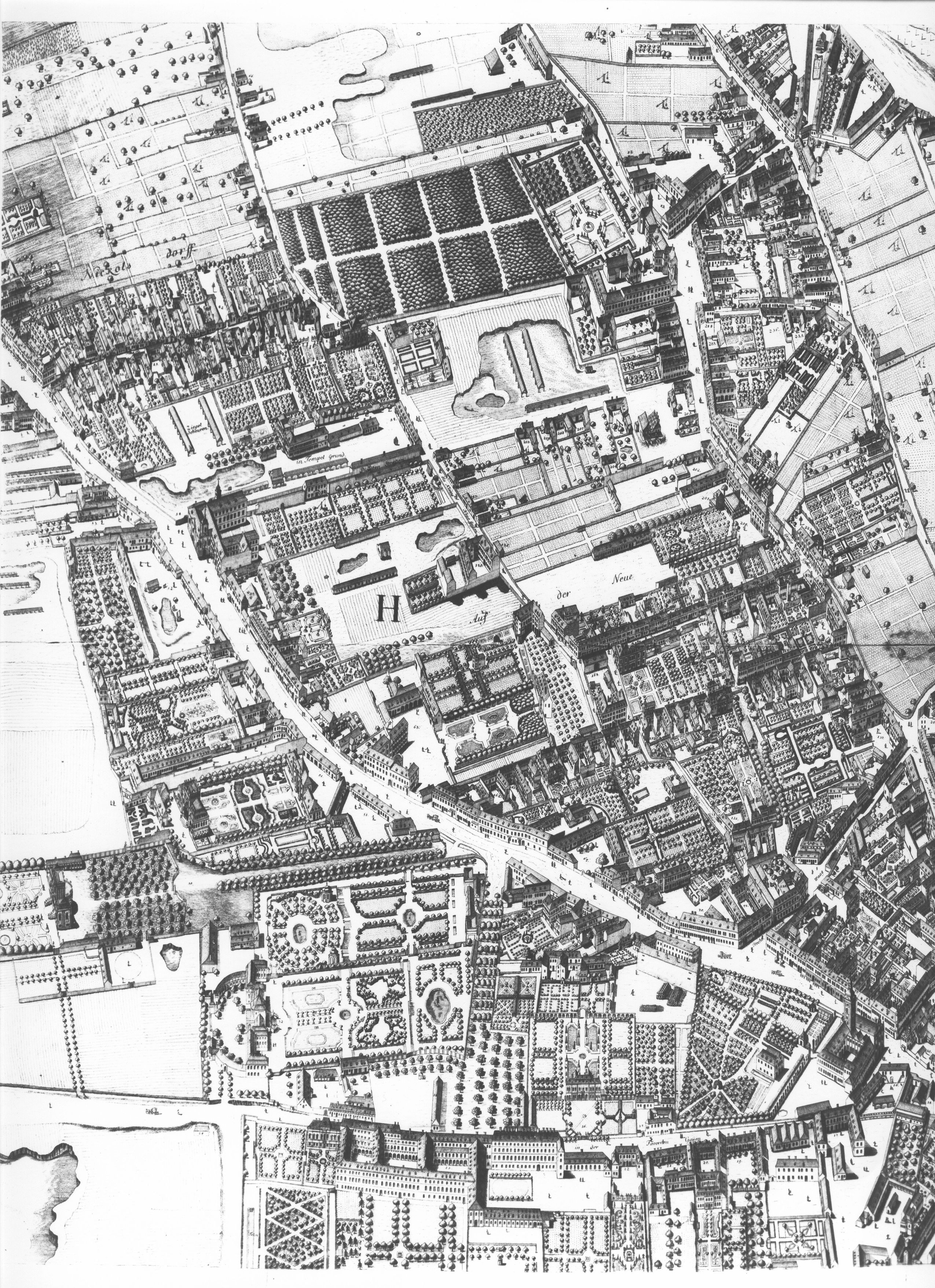 Wiedner Hauptstraße aus der Vogelperspektive